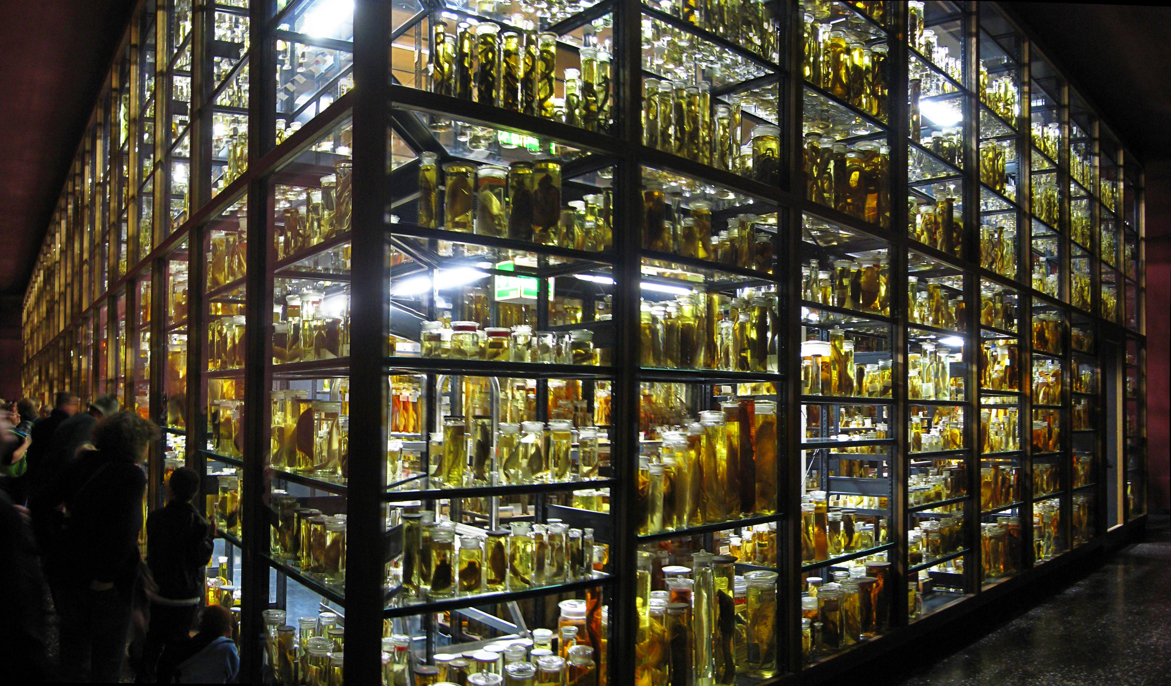 Formalinorgie